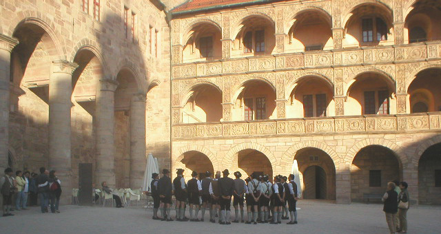 Aufnahme des Schönen Hofes der Plassenburg in Kulmbach aus Richtung des Toreinganges. Zwischen den Arkadengängen sind die zahlreichen Reliefbilder der Hohenzollern zu erkennen.